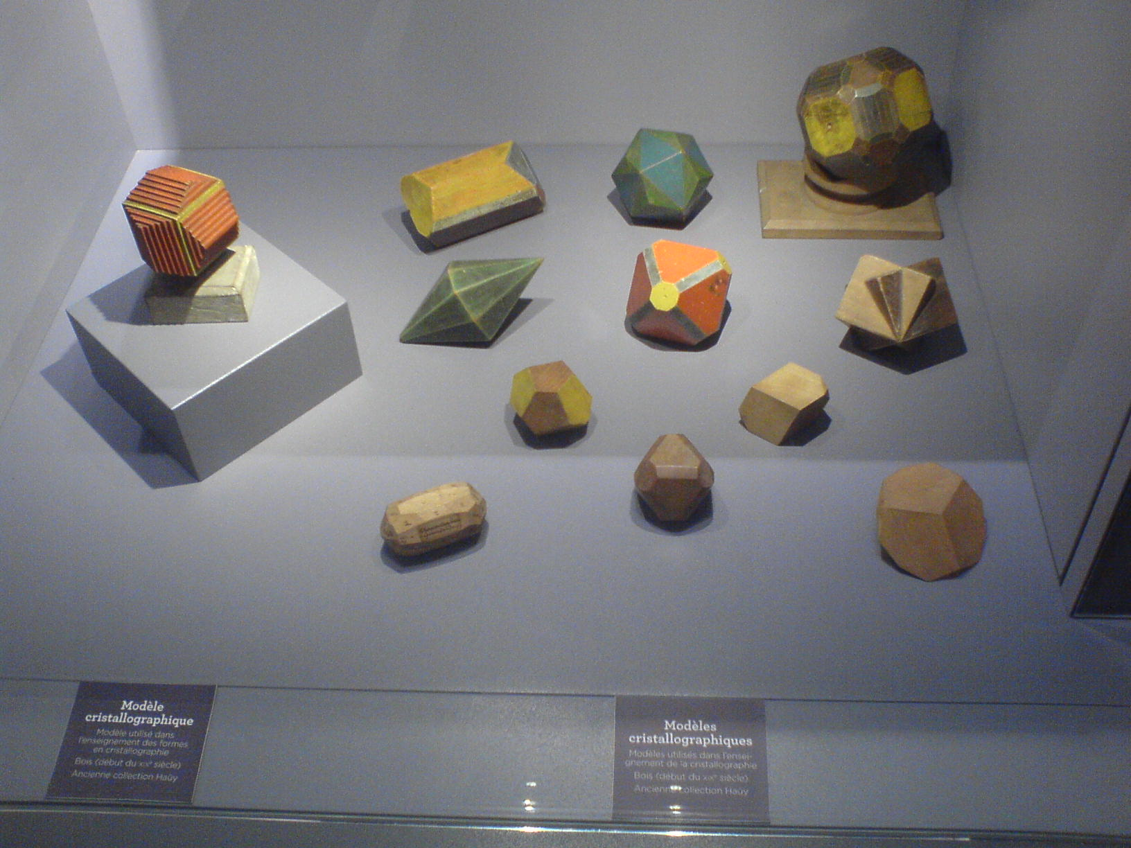 Modèles cristallographiques utilisés pour l'enseignement de la cristallographie. Bois, début du XIXe siècle. Ancienne collection Haüy.